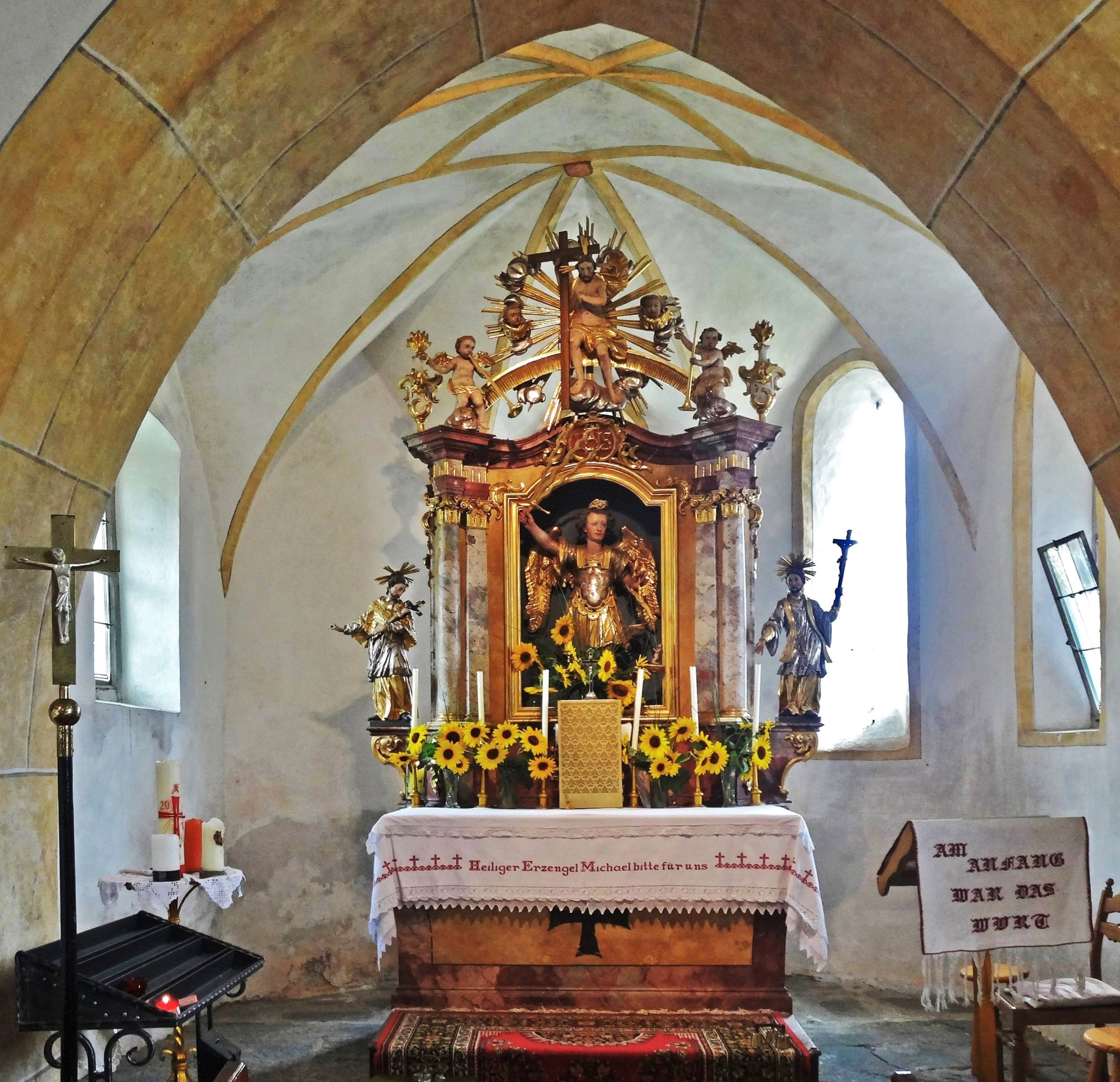 Kath. Filialkirche Hl. Michael, Tauchendorf (Glanegg). Der Hochaltar